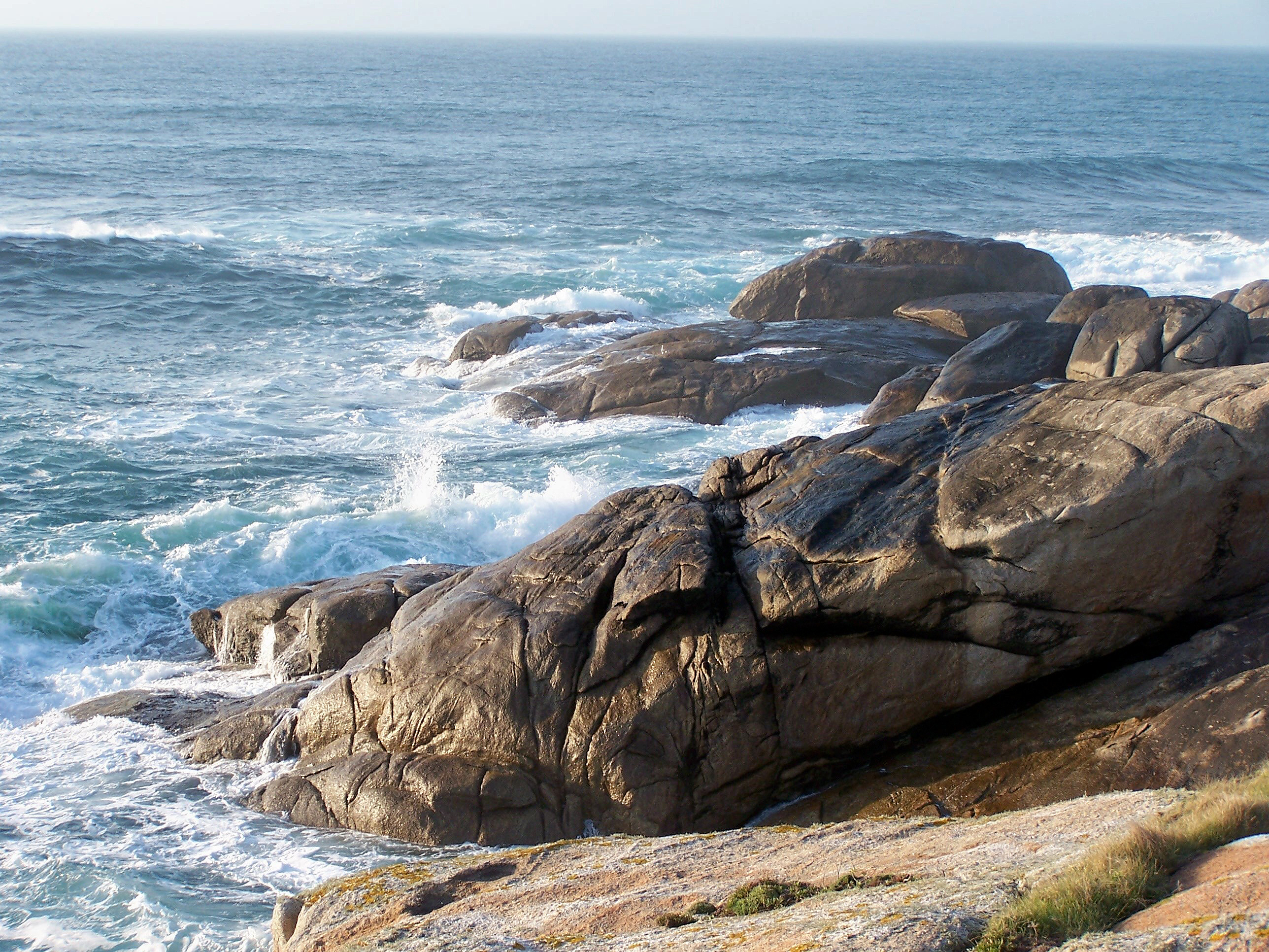 Portosín, Porto do Son, Galiza Mónica Vaamonde Suárez.